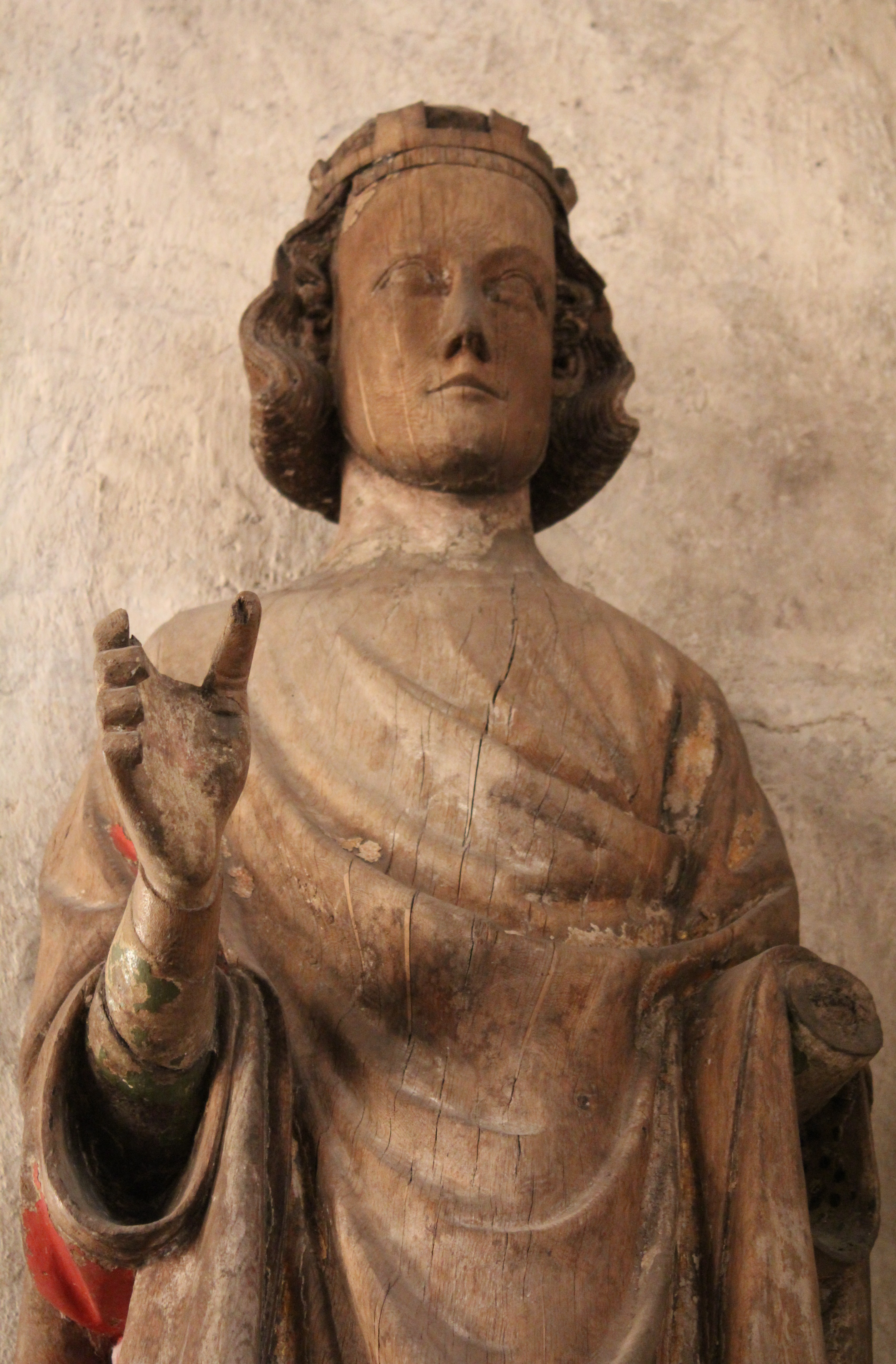 Roslags-Bro kyrka i Norrtälje kommun. Skulptur som trotts föreställa Erik den helige, men som i dag anses föreställa Olav den helige.